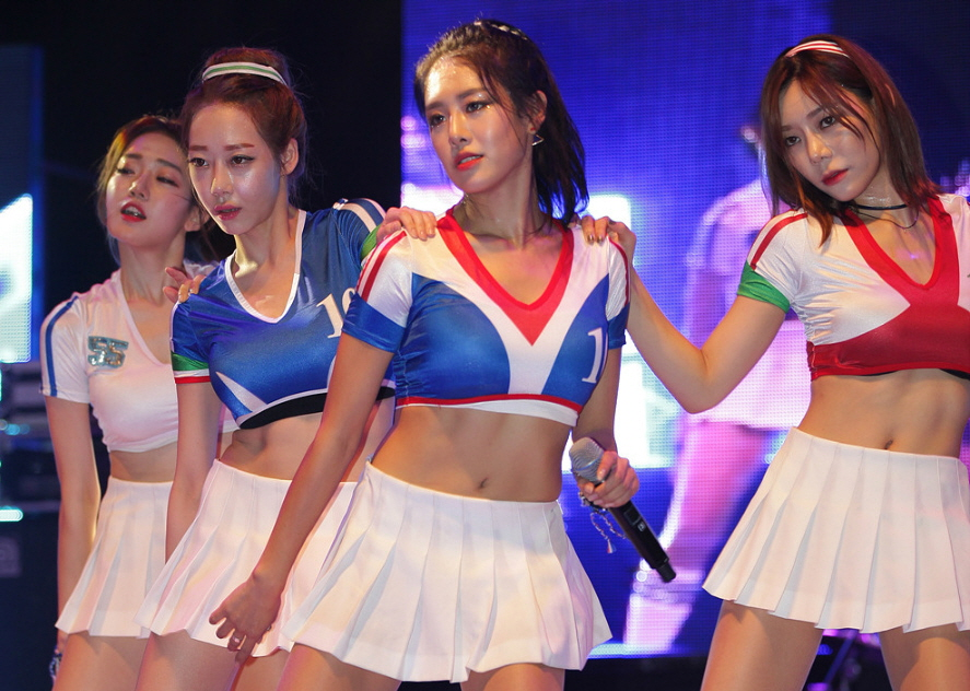 밤비노(Bambino) 안양대학교 축제